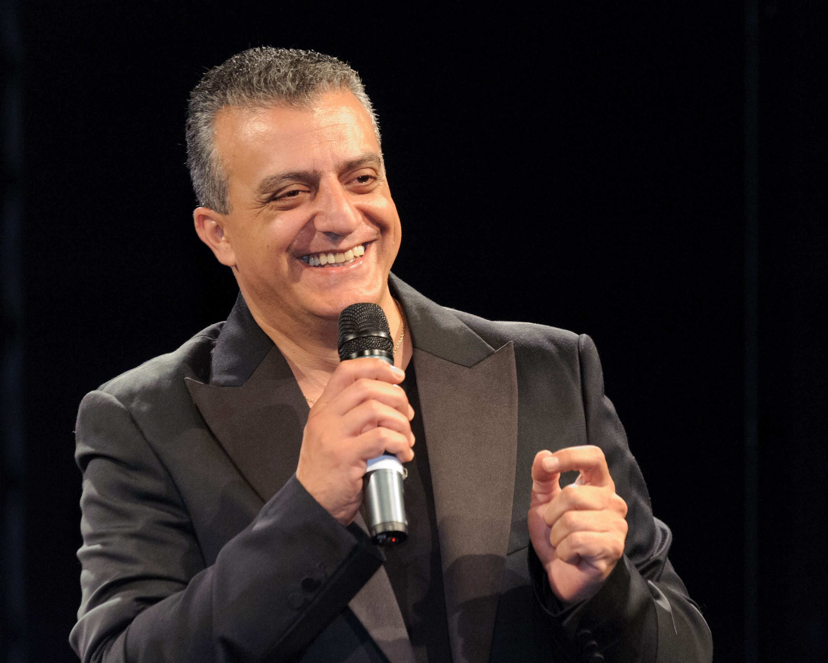 Norman Issa (Schauspieler, Israel, Hauptdarsteller der Serie Arab Labor) Die deutsch-israelischen Literaturtage - organisiert vom Goethe-Institut und der Heinrich-Böll-Stiftung - finden seit sechs Jahren abwechselnd in Berlin und in Tel Aviv statt. Neben Lesungen und Diskussionen gibt es im April auch Filme zu sehen. Abgeschlossen wird *beziehungsweise(n)* durch eine Diskussionsrunde, in der Aktivist/innen, Journalist/innen und Autor/innen über den Begriff der Solidarität, über gesellschaftliche Vorstellungen des Zusammenhalts und der sozialen Gerechtigkeit debattieren. Foto: Stephan Roehl